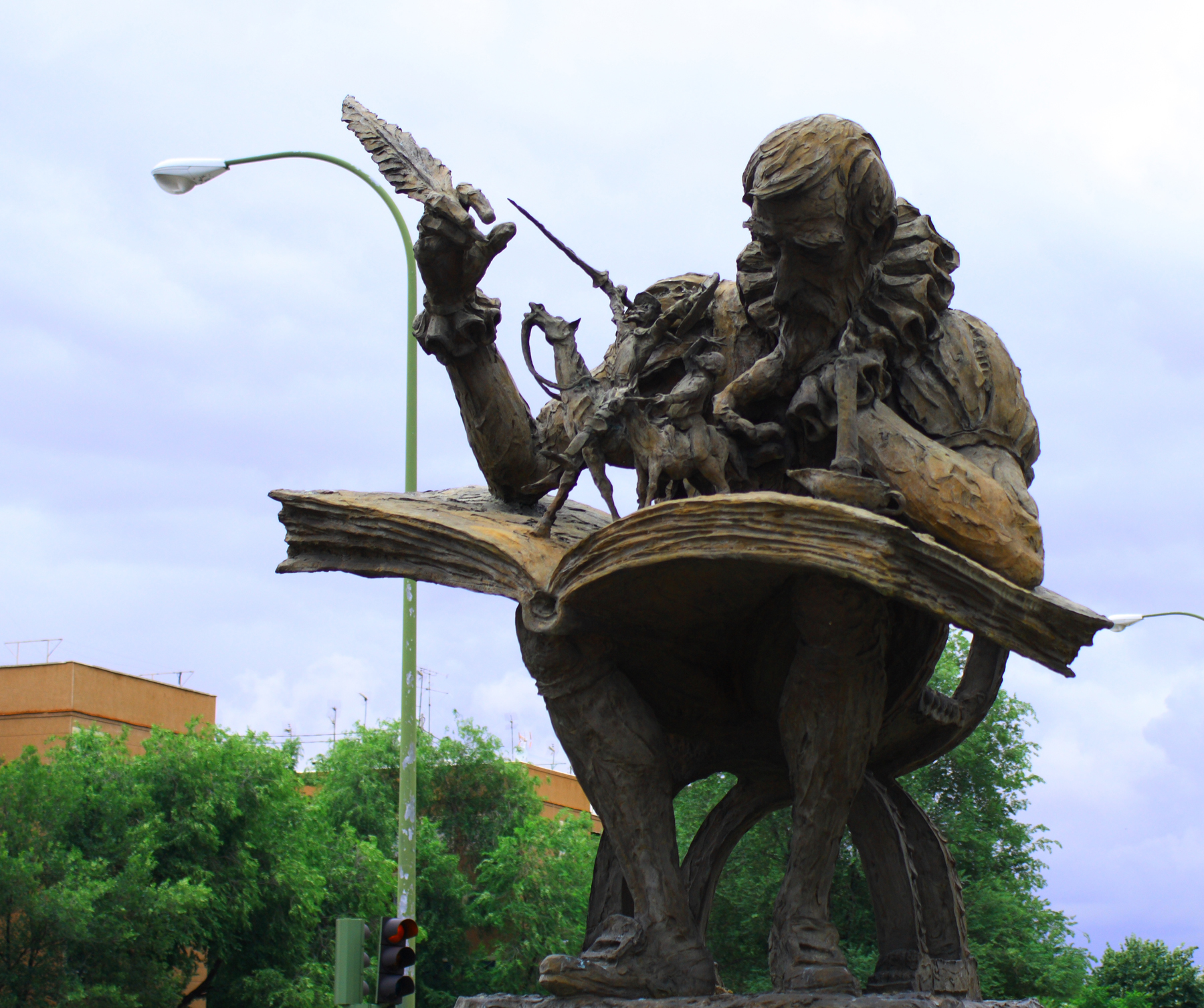 Miguel de Cervantes Avenida de Arcentales Madrid Comunidad de Madrid España